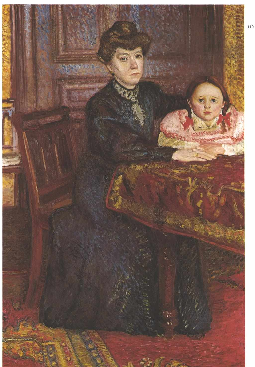 Portrait of Mathilde Schönberg